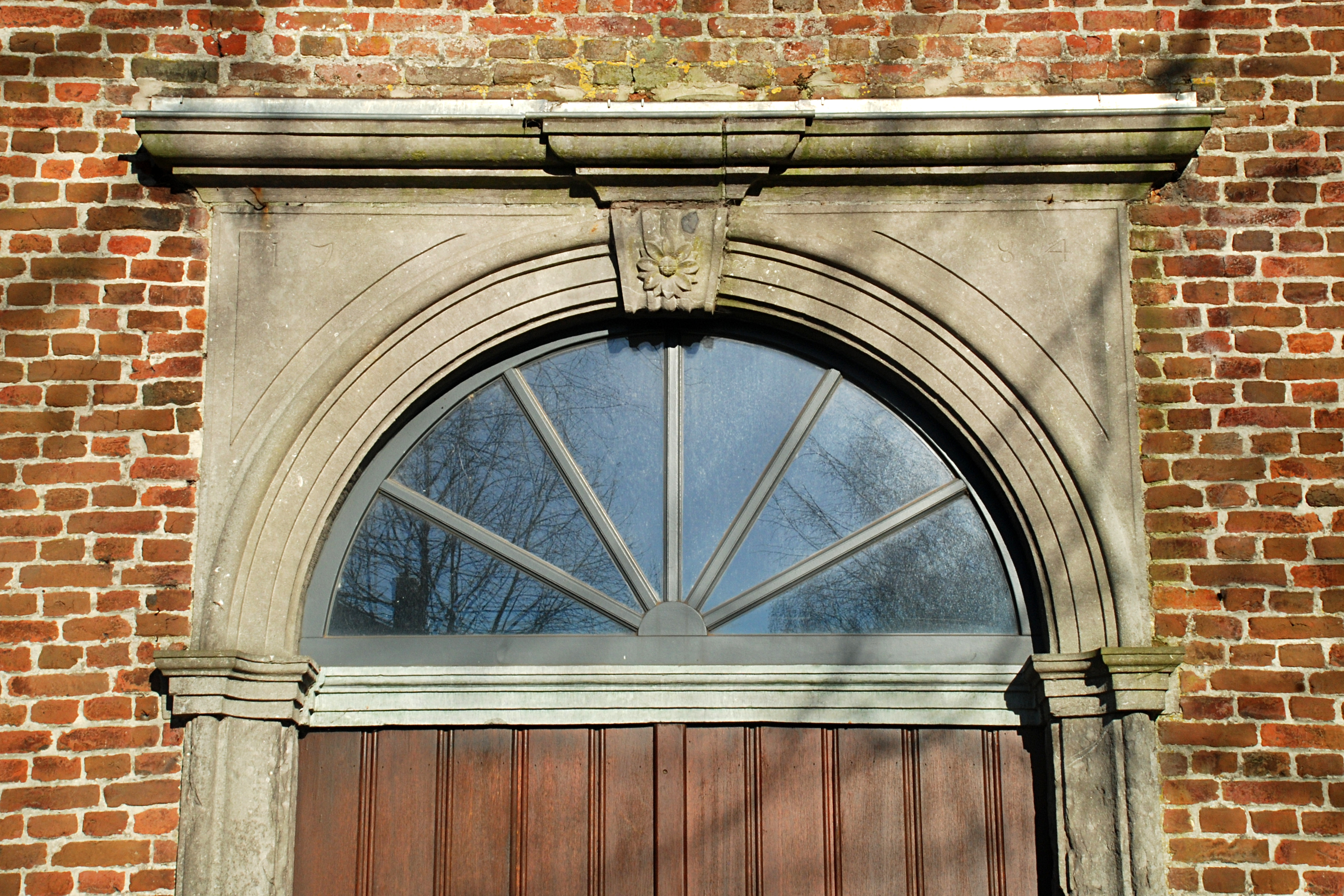 Belgique - Brabant wallon - Chastre - Église Sainte-Gertrude de Gentinnes